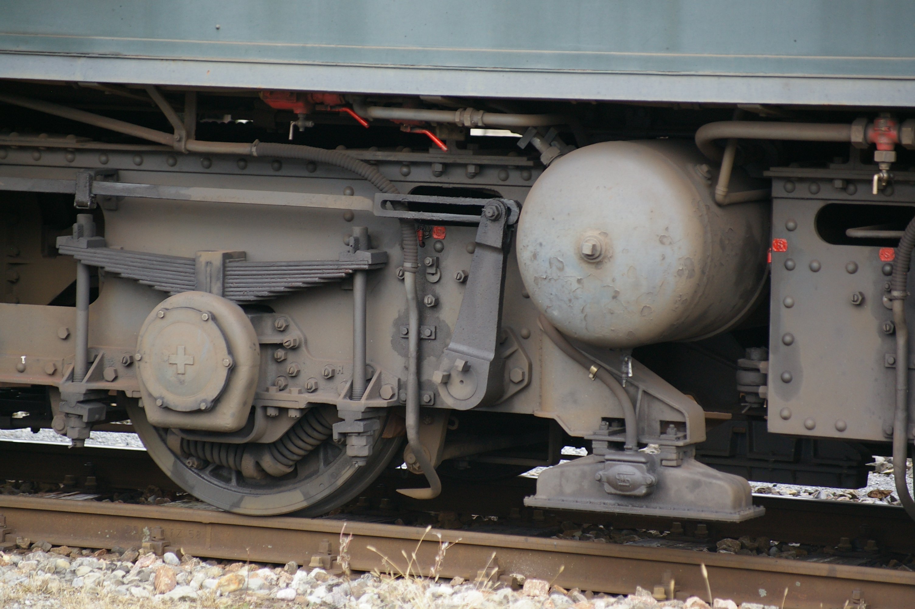 Rad mit Sécheron-Hohlwellen-Federantrieb an der Be 4/4 Nr. 15 des Dampfbahn-Vereins Zürcher Oberland im Bahnhofe von Bauma, gebaut 1931 inn den Ateliers de Sécheron und der Schweizeriſchen Machines-Fabrique zů Winterthur für die Bodenſee—Toggenburg-Bahn.